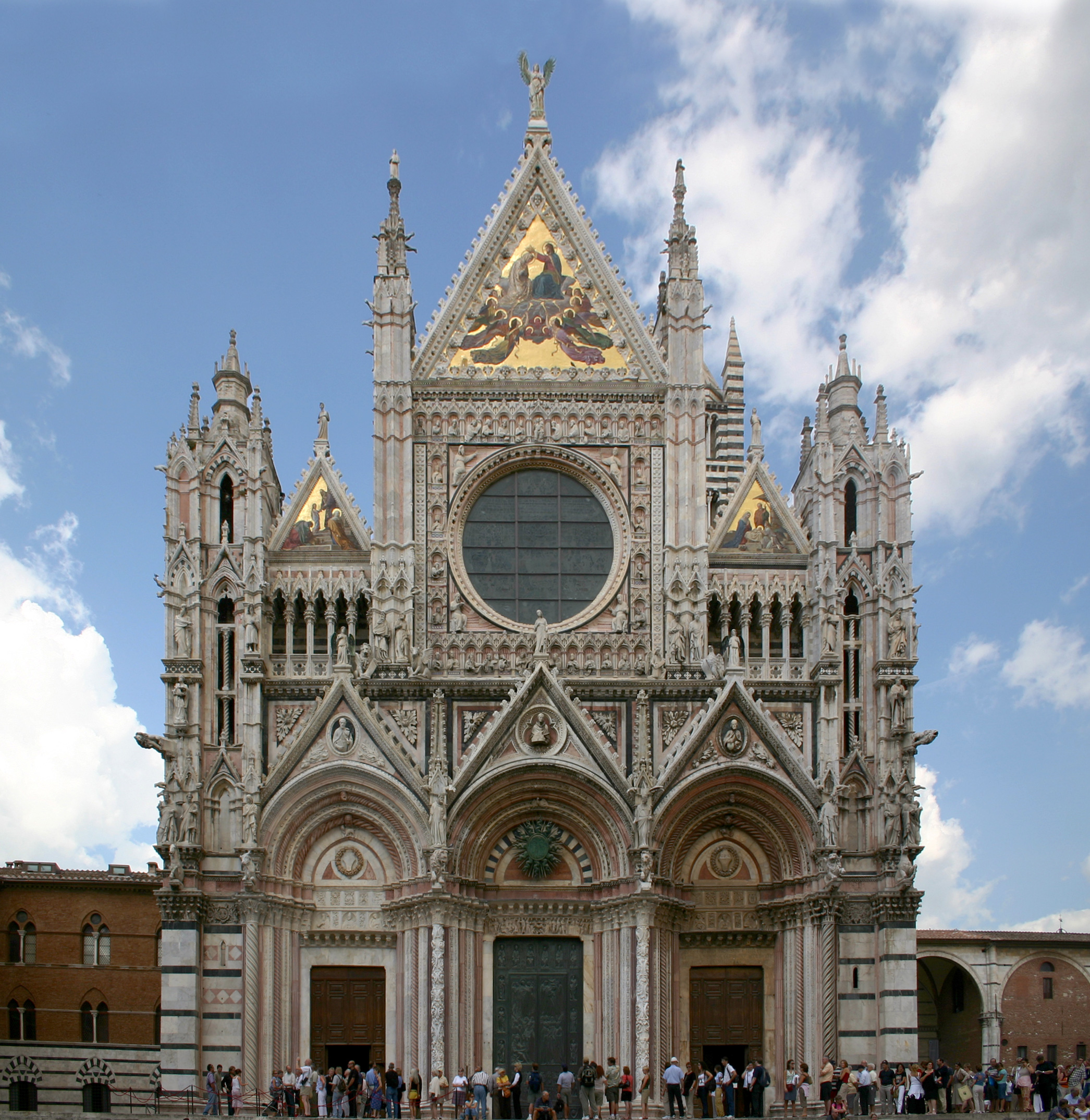 Fassade (vermutlich Giovanni Pisano) der Kathedrale von Siena